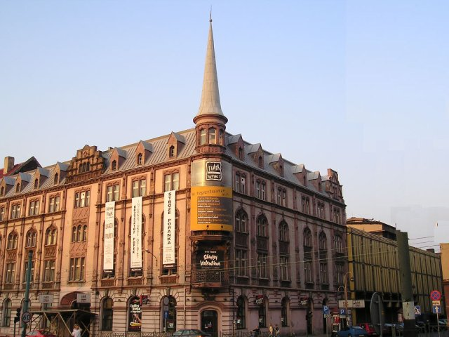 Rozrywki Theater, Chorzów, Poland